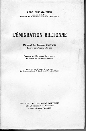 L'ouvrage phare de l'abbé Elie Gautier : " L'émigration Bretonne", publié en 1953